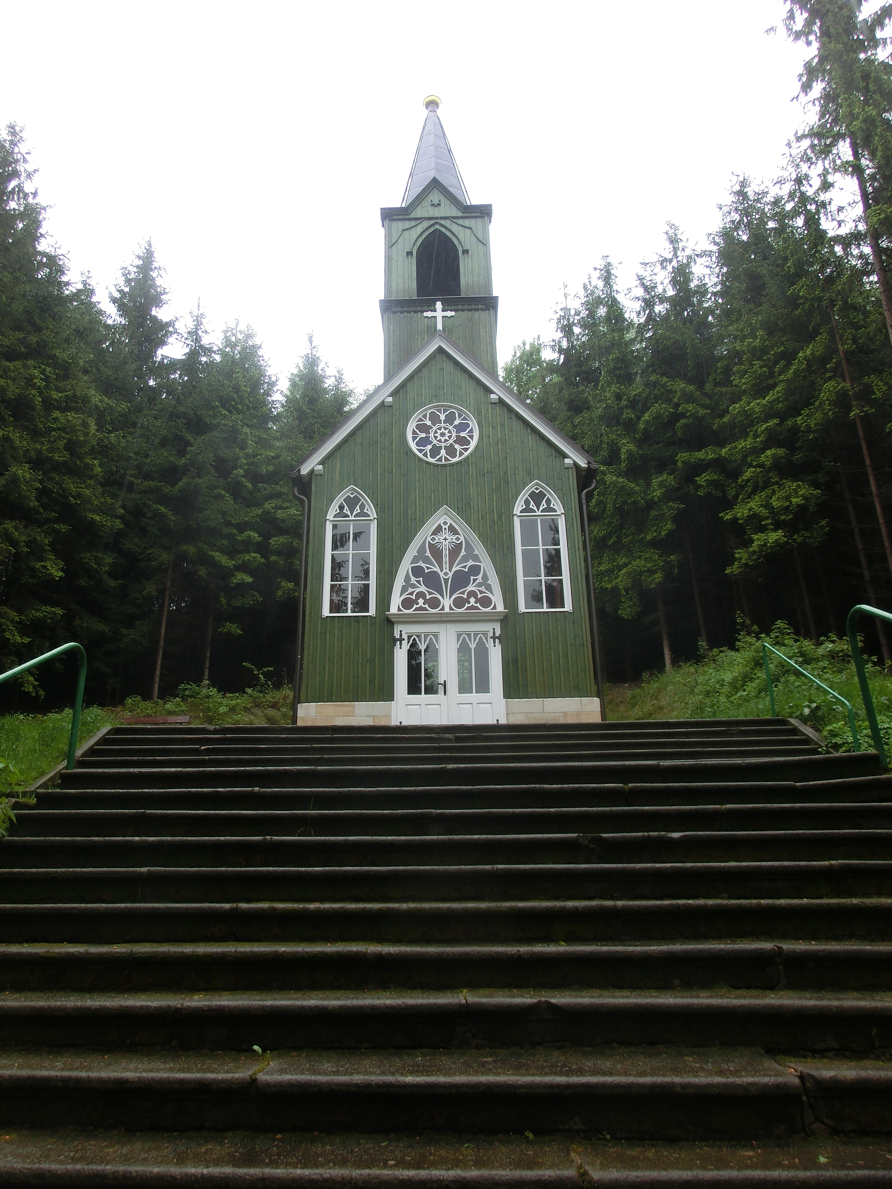 Suchý Důl, Ticháčkův les, Růžencová lesní kaple